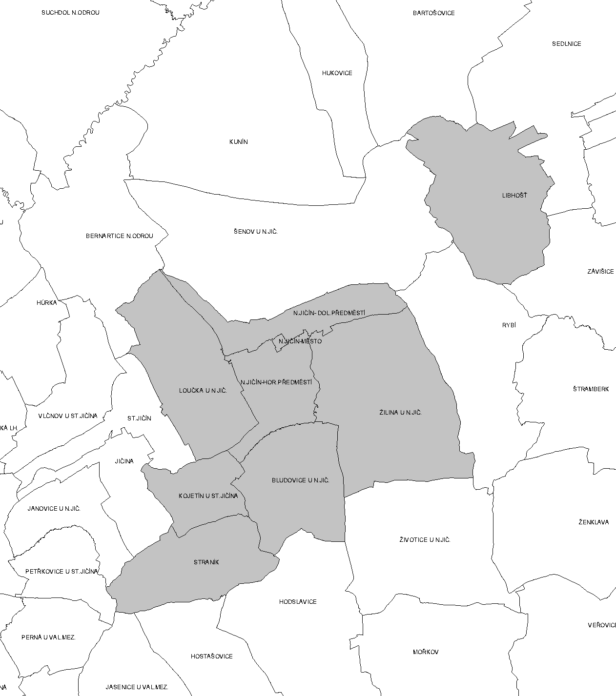 Katastrální území Nového Jičína (stav r. 2010 před osamostatněním Libhoště)